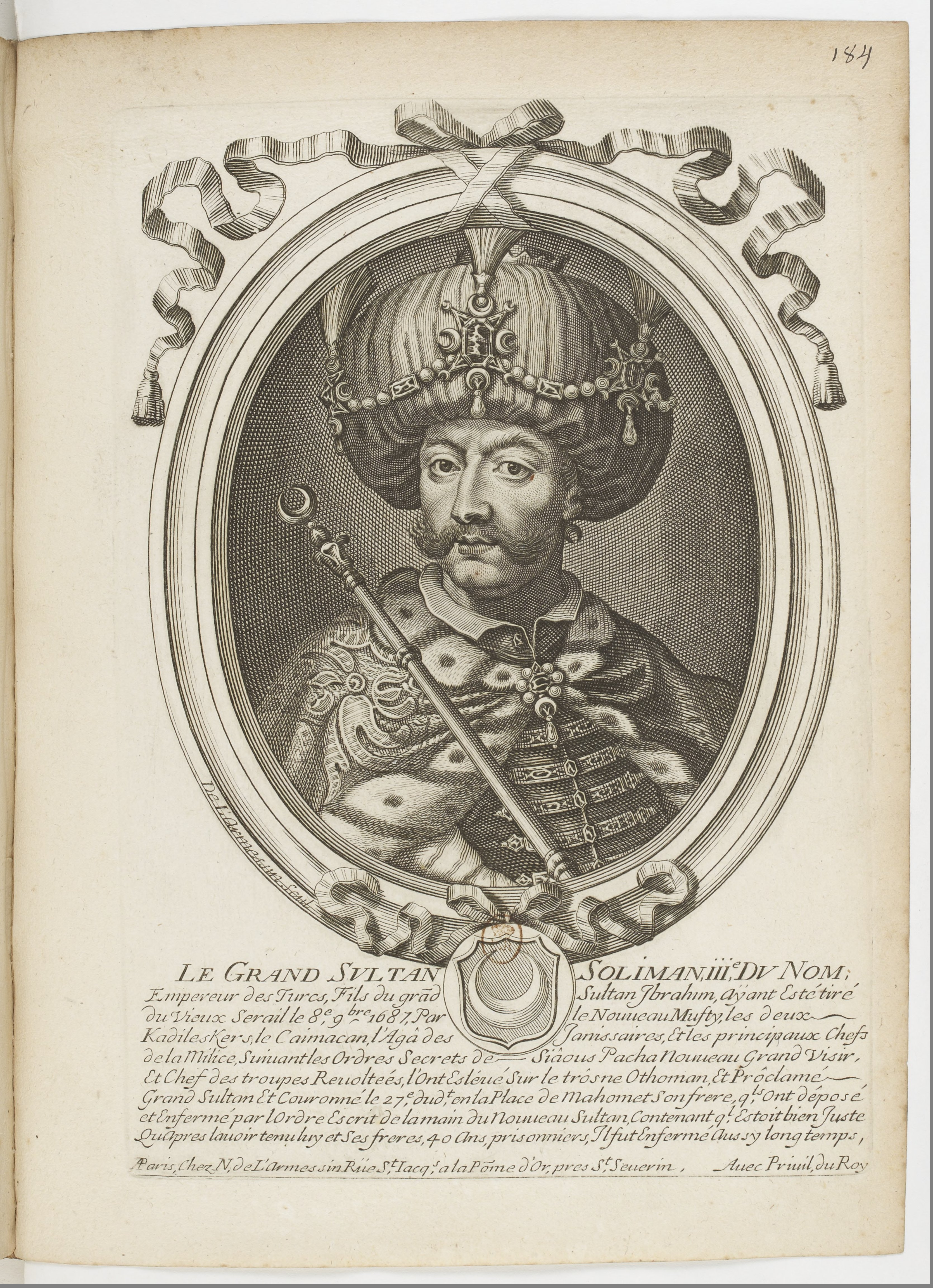 Les augustes représentations de tous les rois de France, depuis Pharamond jusqu'à Louis XIV,... avec un abrégé historique sous chacun, contenant leurs naissances, inclinations et actions plus remarquables pendant leurs règnes